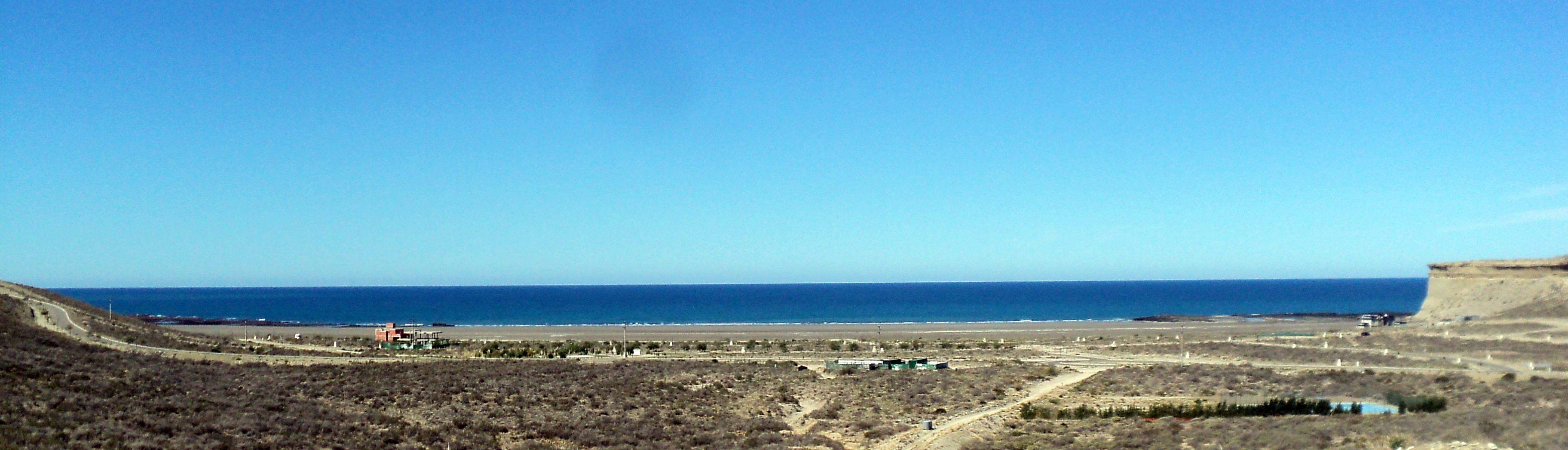 Vista panorámica de la playa y el country